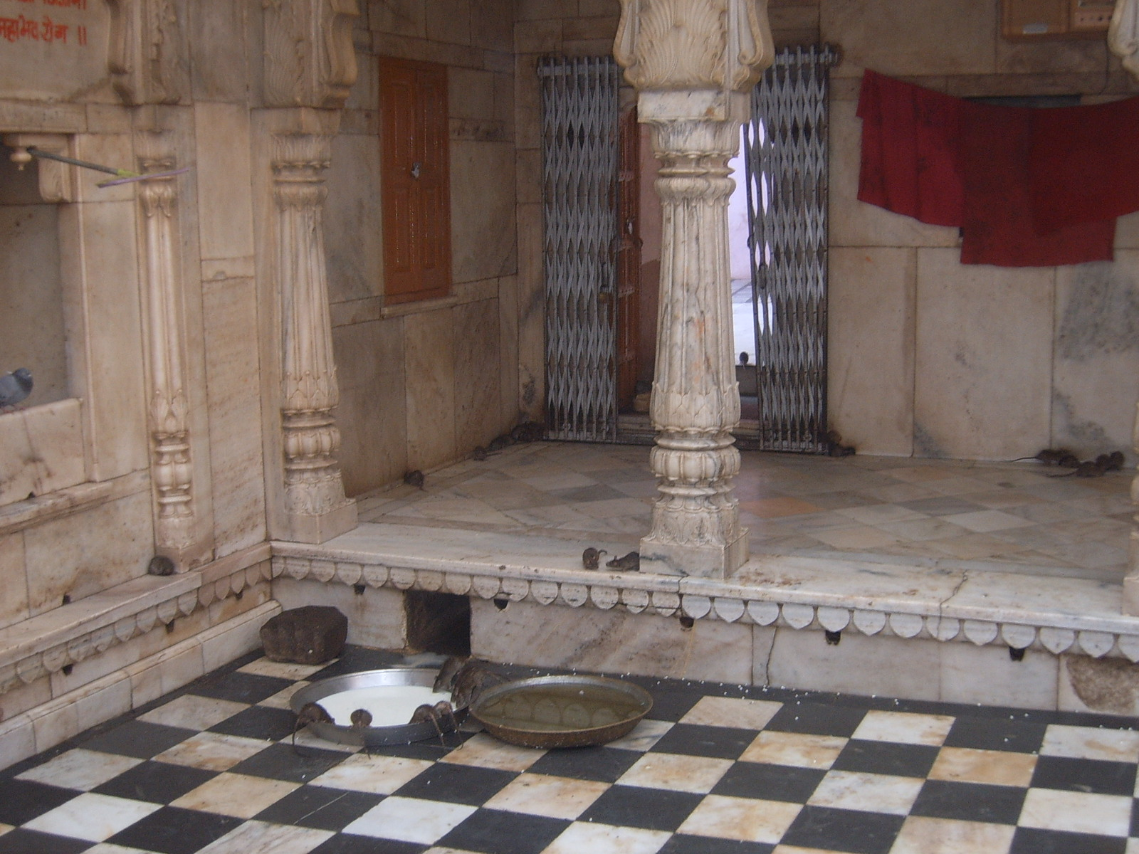 Karnimata temple in Bikaner